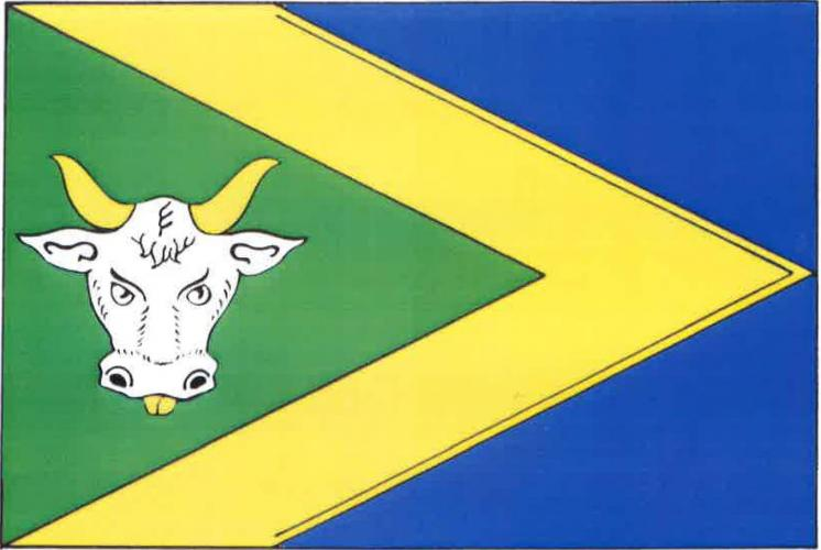 vlajka, Volárna , okres Kolín